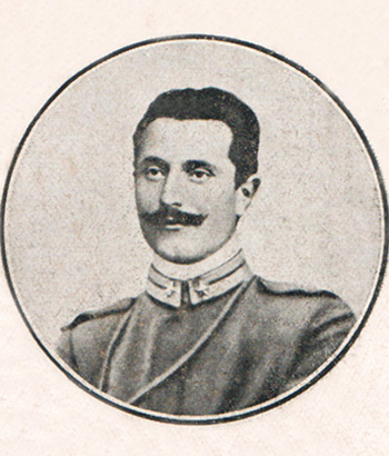 Giuseppe Sinigaglia, sportivo e militare italiano